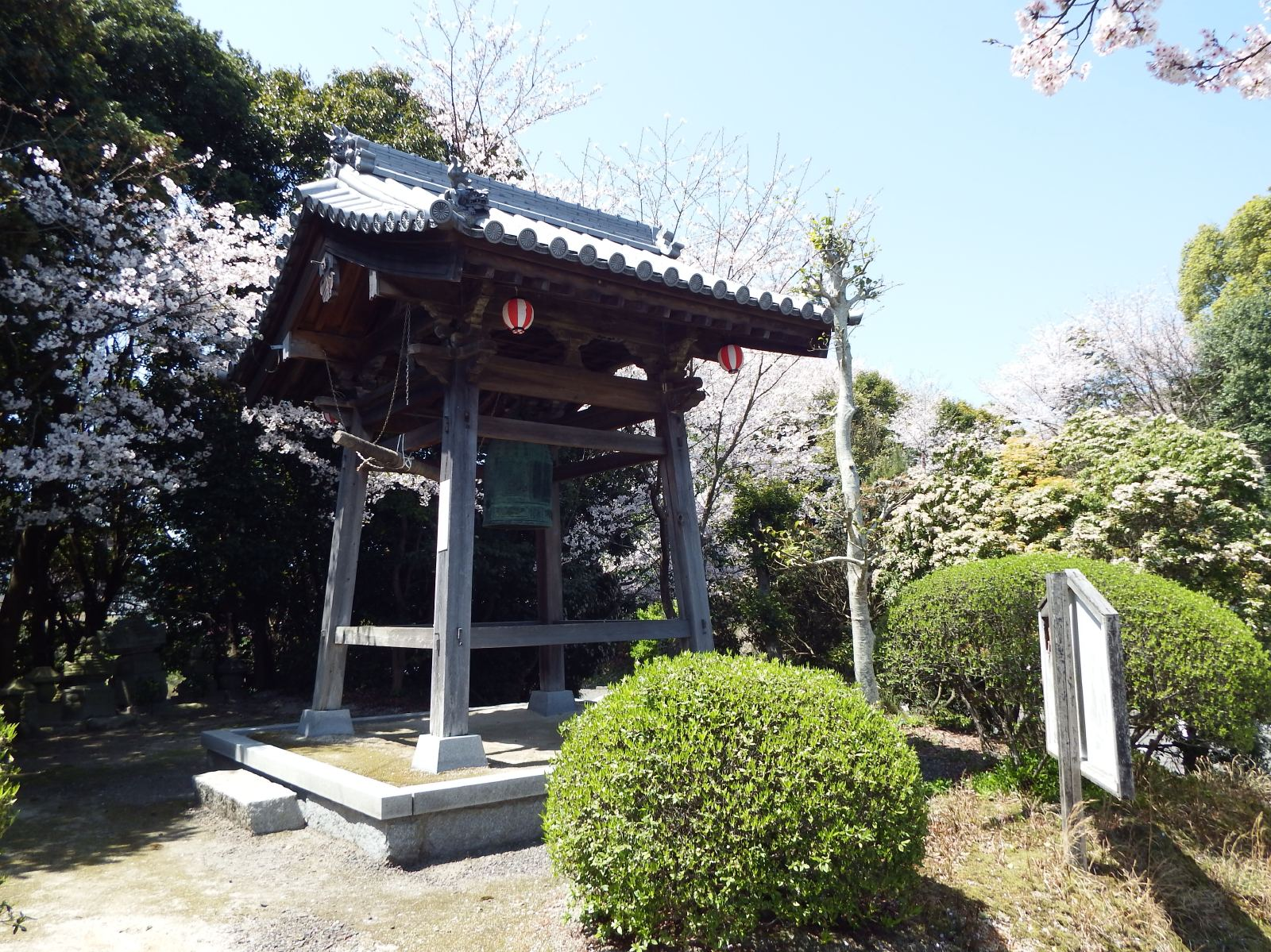 延命寺 鐘楼